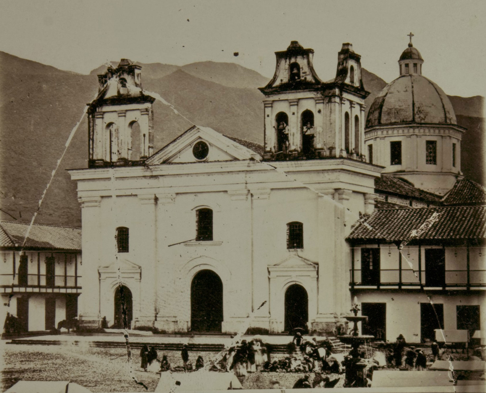 Iglesia de la Candelaria, (fotografía tomada en 1870 por Pastor Restrepo, en la imagen se ve que aun las torres están inconclusas.) Medellín, Colombia.